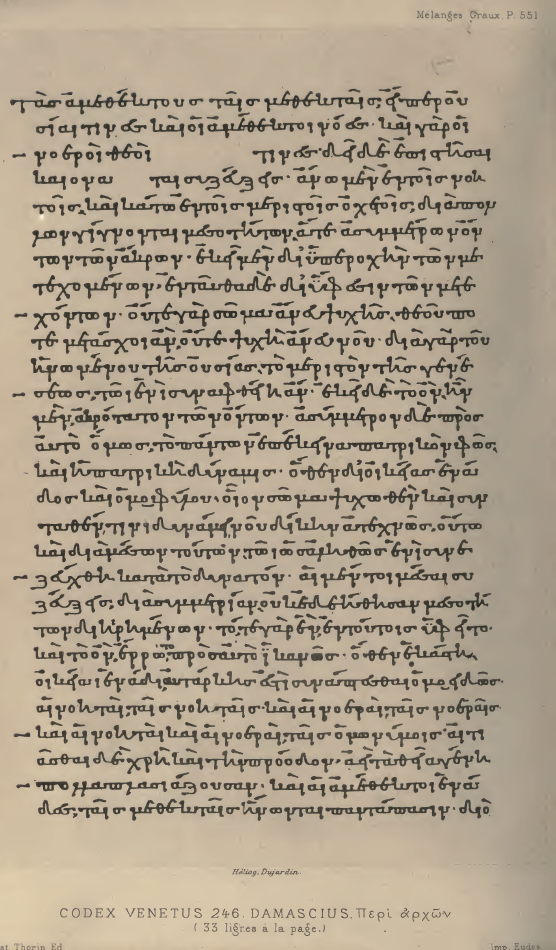 Fac-similé d'une page du Marcianus graecus 246, le manuscrit A de Damascius.